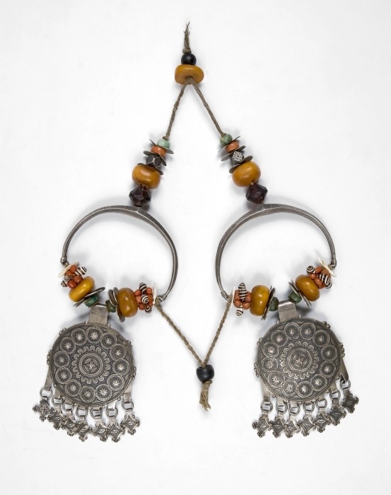 Hoofdversiering van zilver bestaande uit twee oorhangers die zijn versierd met kralen en hangers. Dit hoofdsieraad werd gedragen bij ceremoniële gelegenheden, zoals bruiloften, niet bij de alledaagse bezigheden. Het sieraad behoorde tot de traditionele uitzet van de Berbervrouwen uit Akka (ook wel gespeld als Aqqa); een dorp, douar, gelegen in de regio van de zuidelijke Anti-Atlas en de Presahara. Akka werd bewoond door frakties van de omliggende Berbergroepen. Soms worden de bewoners ook aangeduid als de Ait Aqqa, eerder een verzamelnaam. De oorhangers worden gevormd door telkens een halve boogvormige ring (tizadad in het Berbers) met daaraan in het midden een ronde hanger met geometrische versiering in niëllo. Aan elk van deze twee ronde platen hangen zeven ruitvormige hangertjes. De oorhangers worden op hun plaats gehouden door het touw bovenaan dat, over het hoofd bevestigd, tegelijkertijd het gewicht helpt dragen. Het touw dat de twee halve bogen verbindt en achterop het hoofd wordt bevestigd, houdt het geheel in evenwicht.